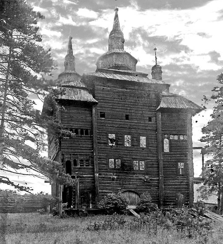 Надвратная церковь Усть-Киренского Свято-Троицкого монастыря